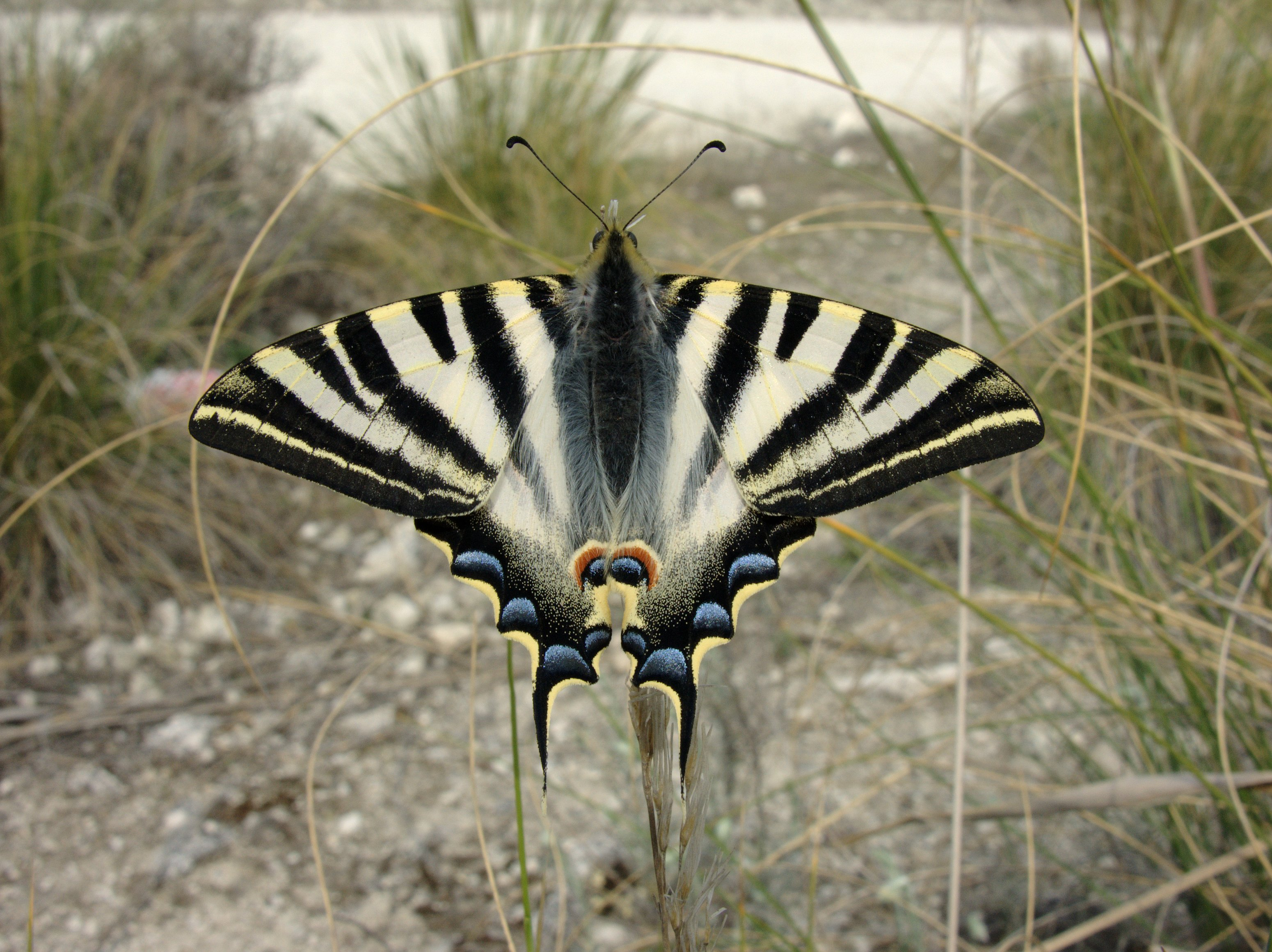 Iphiclides feisthamelii . Rivas Vaciamadrid, Madrid, España.